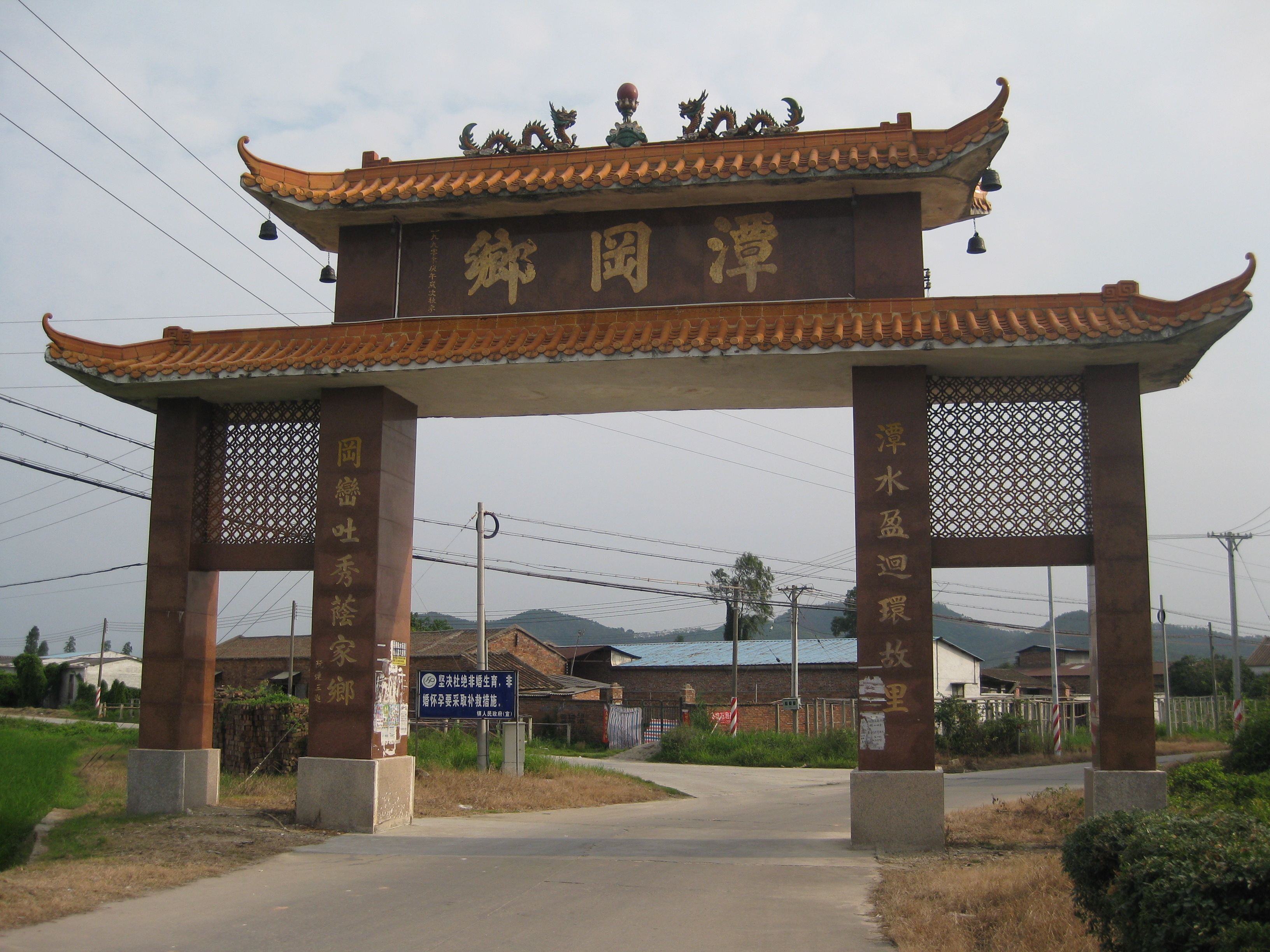 广东省江门市新会区潭冈乡牌楼